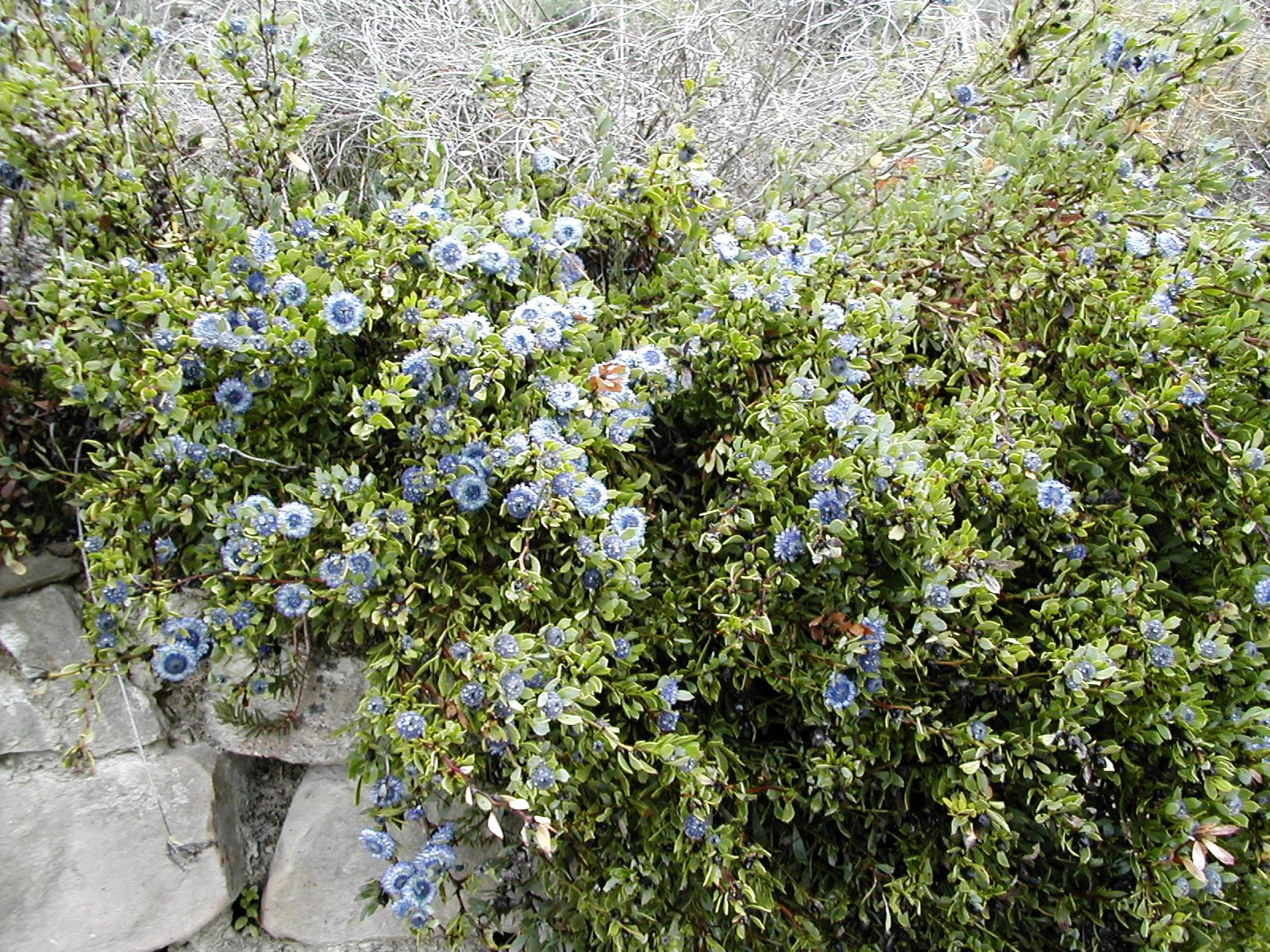 Globularia alypum Author: David Gaya Place: Vallhonesta, Sant Vicenç de Castellet, Bages (Catalonia)